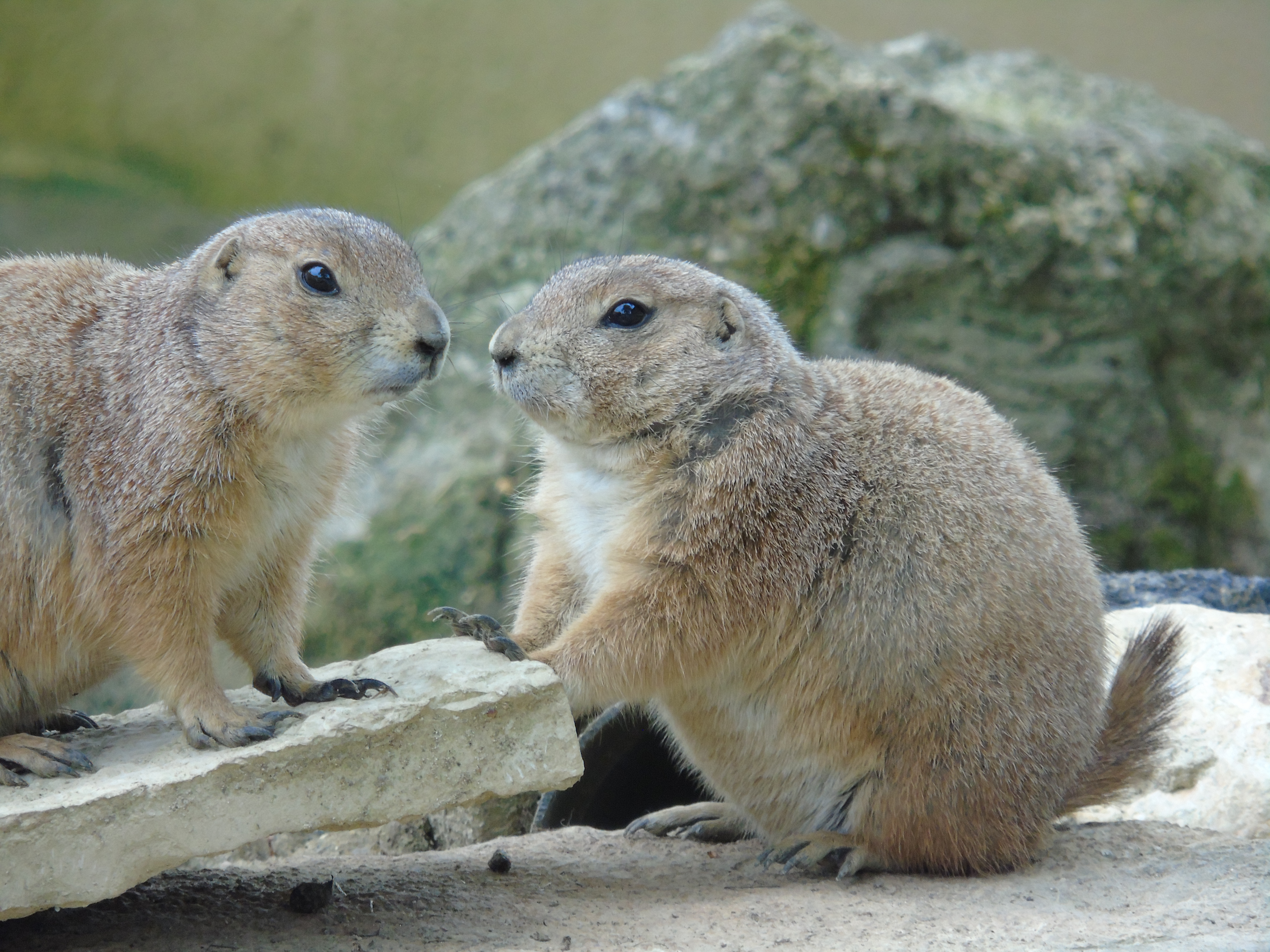 Chiens de prairie du Colorado (Cynomys gunnisoni) au Parc Zoologique du Bois d’Attilly